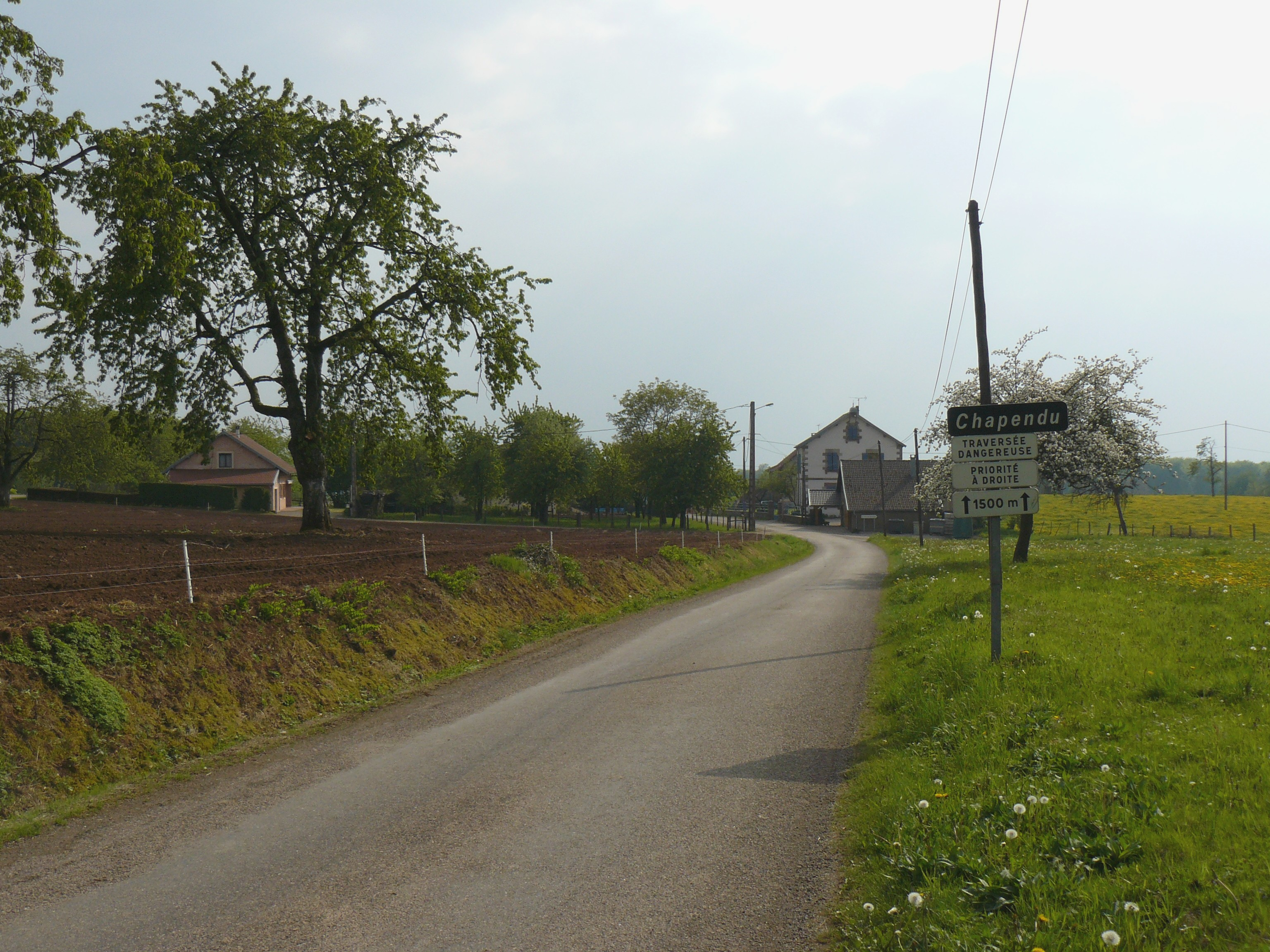 Entrée du hameau de Chapendu (Raddon-et-Chapendu, Haute-Saône, France)